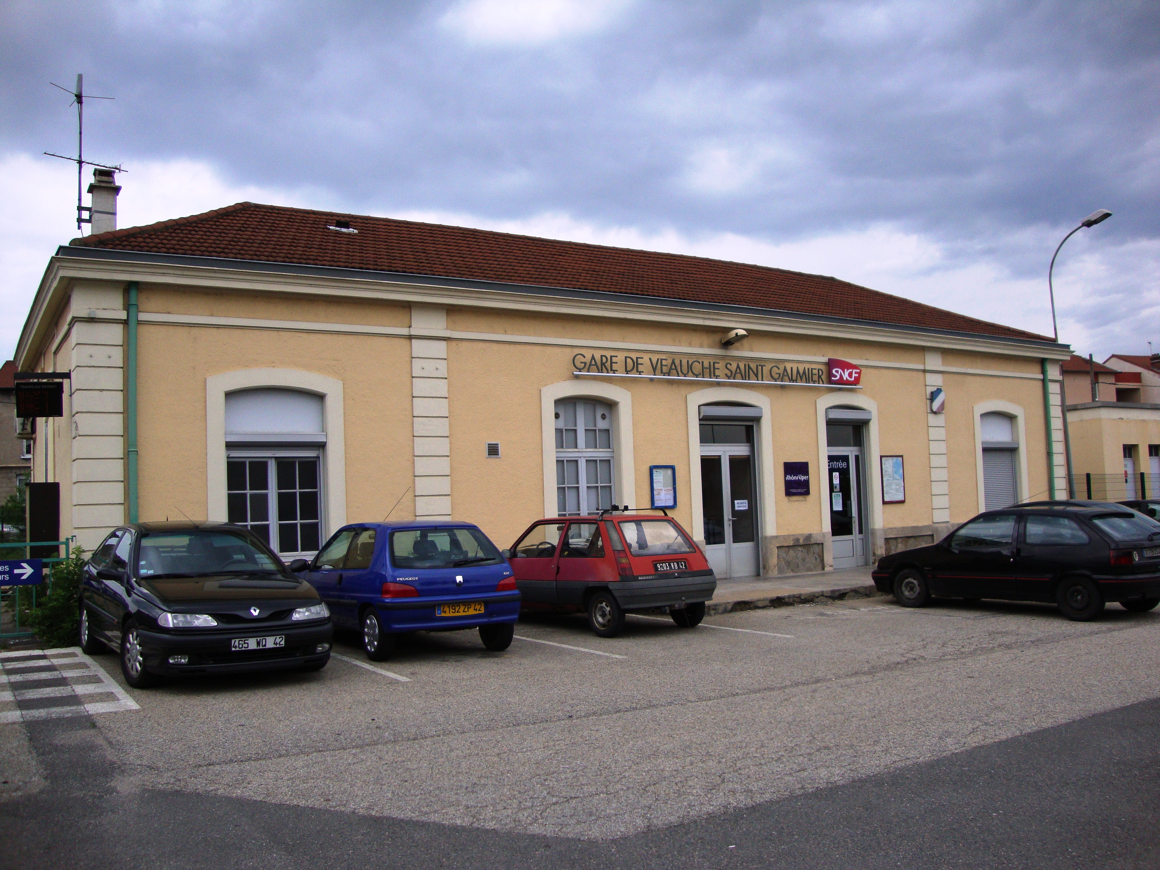 Veauche (Loire, Fr) gare de Vauche Saint-Galmier